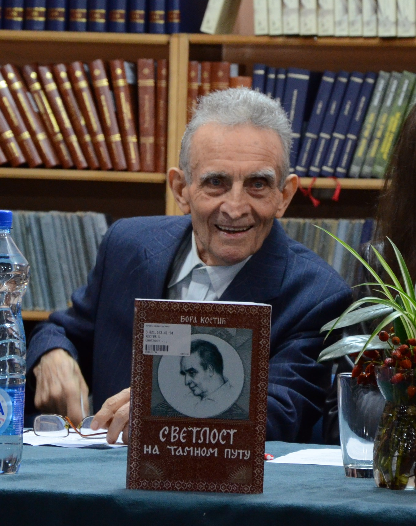 Promocija knjige Bore Kostića "Svetlost na tamnom putu" u čitaonici Narodne biblioteke Pirot